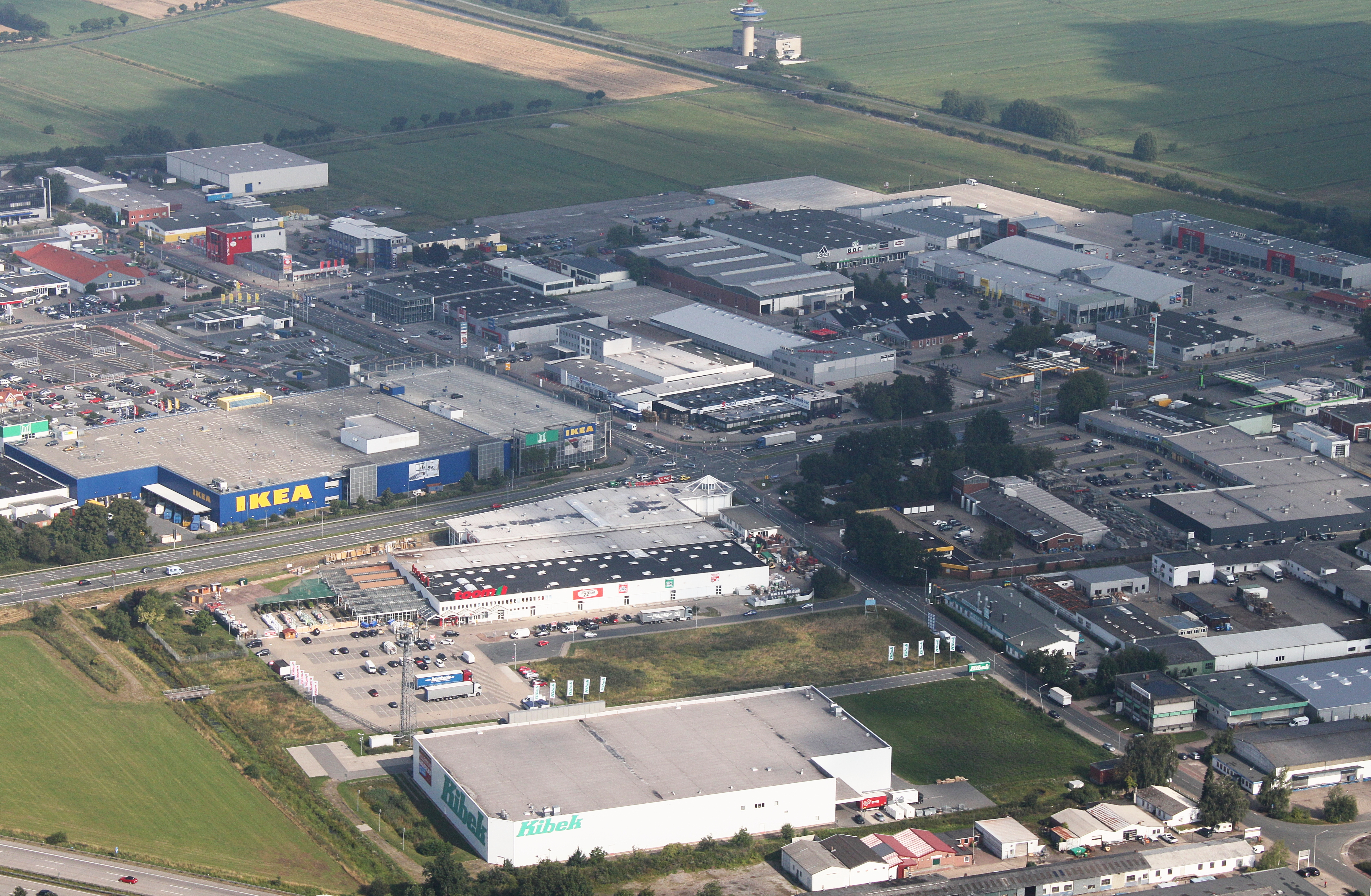 Luftaufnahme; entlang der A1 (auf der Südseite) von der Autobahnabfahrt Arsten bis zum Bremer Kreuz; Blickrichtung nach Norden